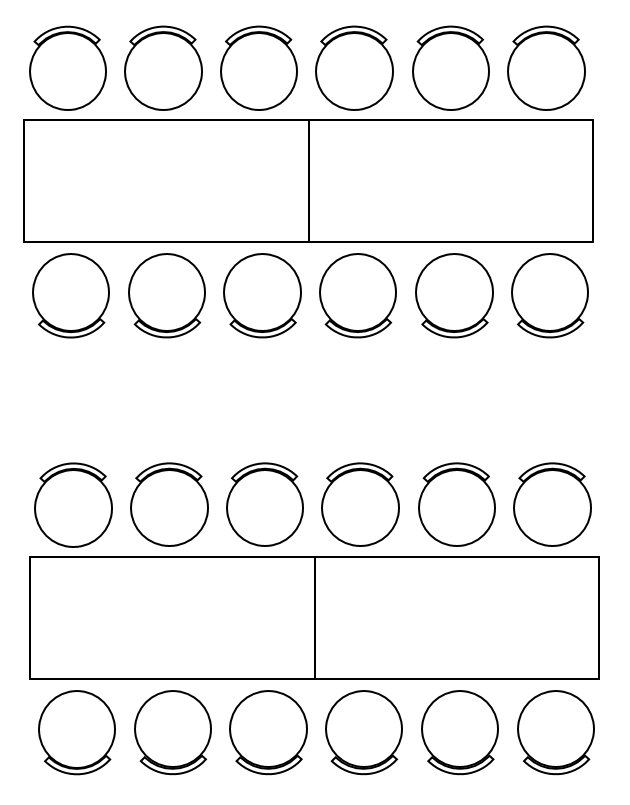 Bordoppsett Langbord